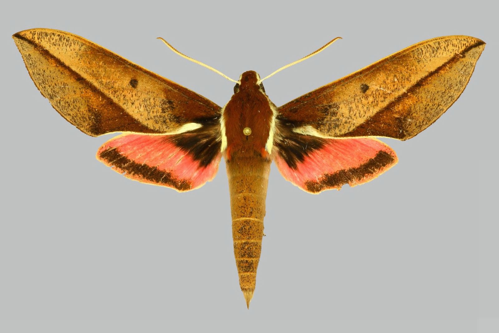 Chaerocina zomba, male, upperside. Malawi, Nyika